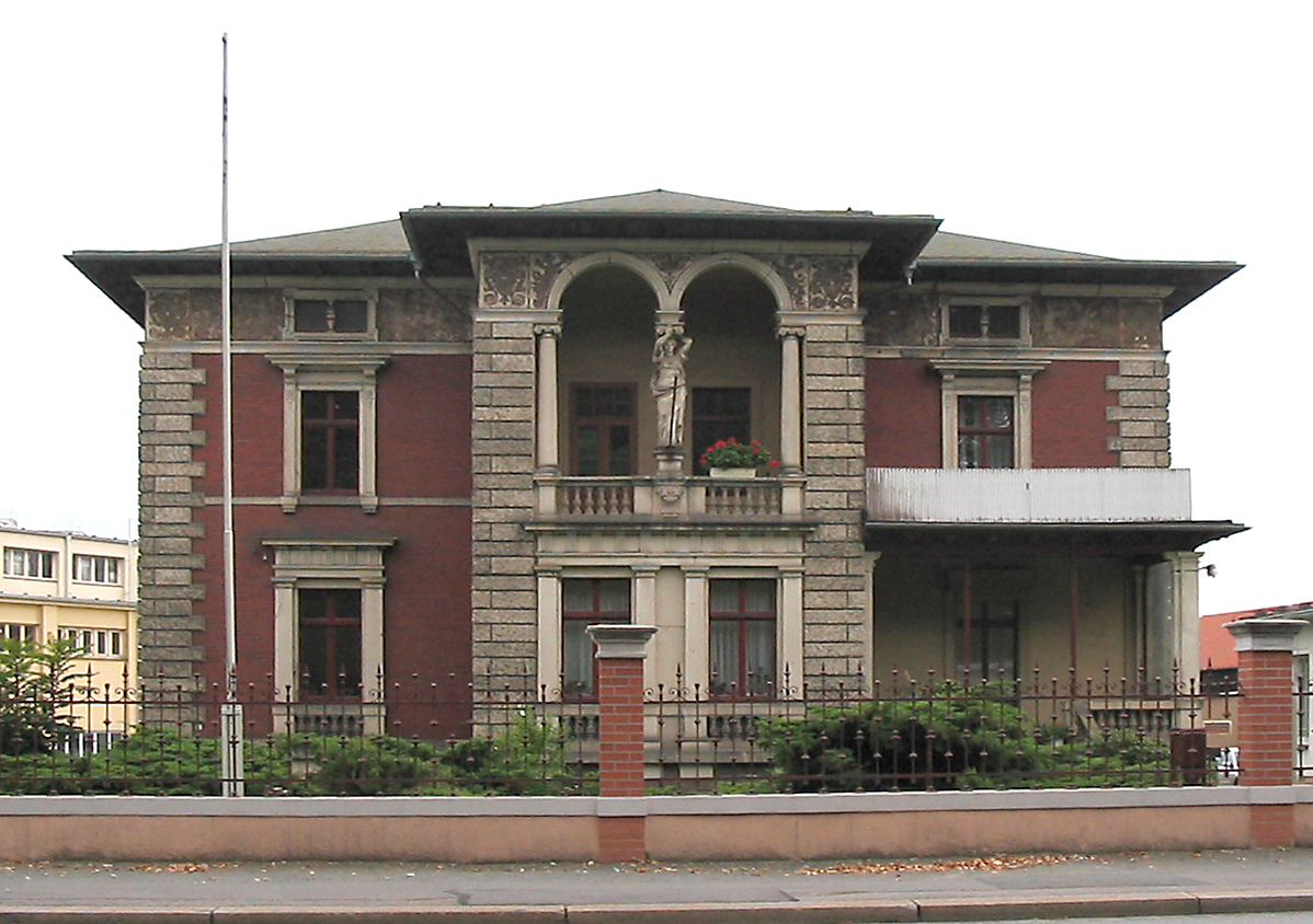 Villa Otto E. Weber nicht mittags fotografieren, da gegenlicht